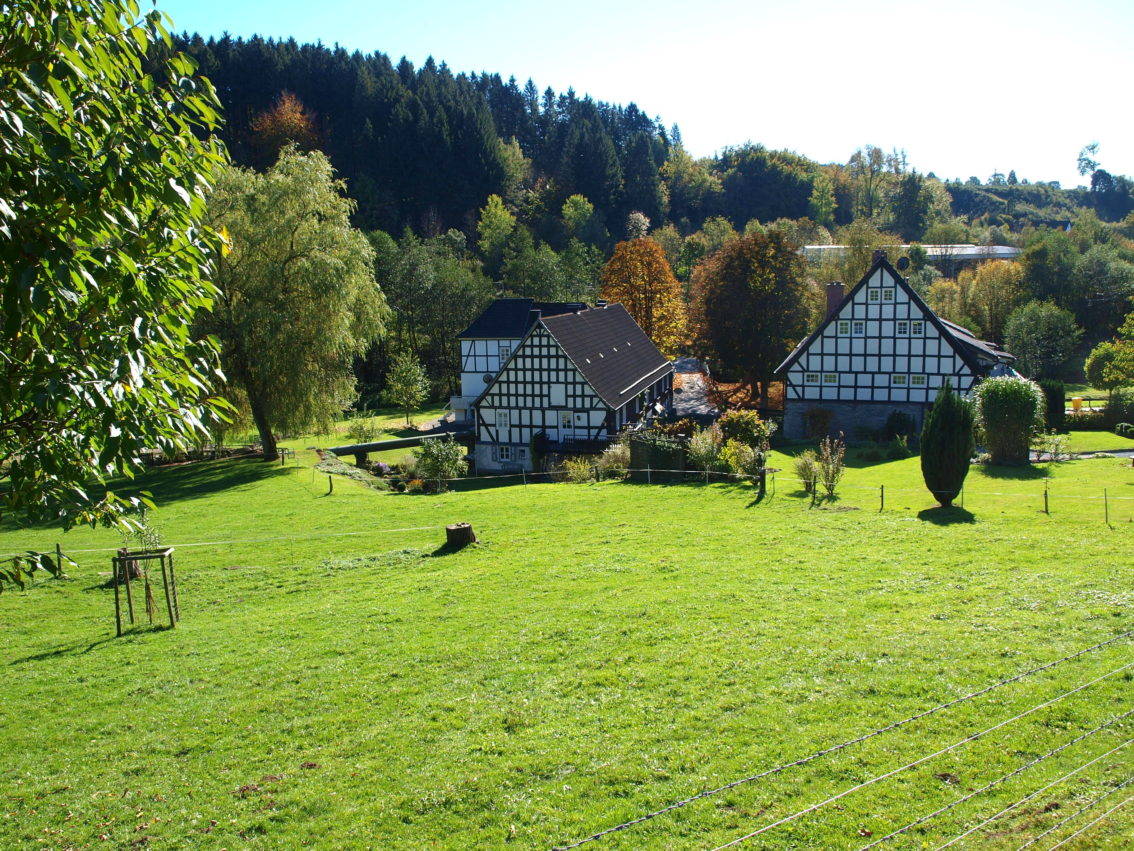 Die Gebäude der Frettermühle 2010 von der Straße nach Schönholthausen